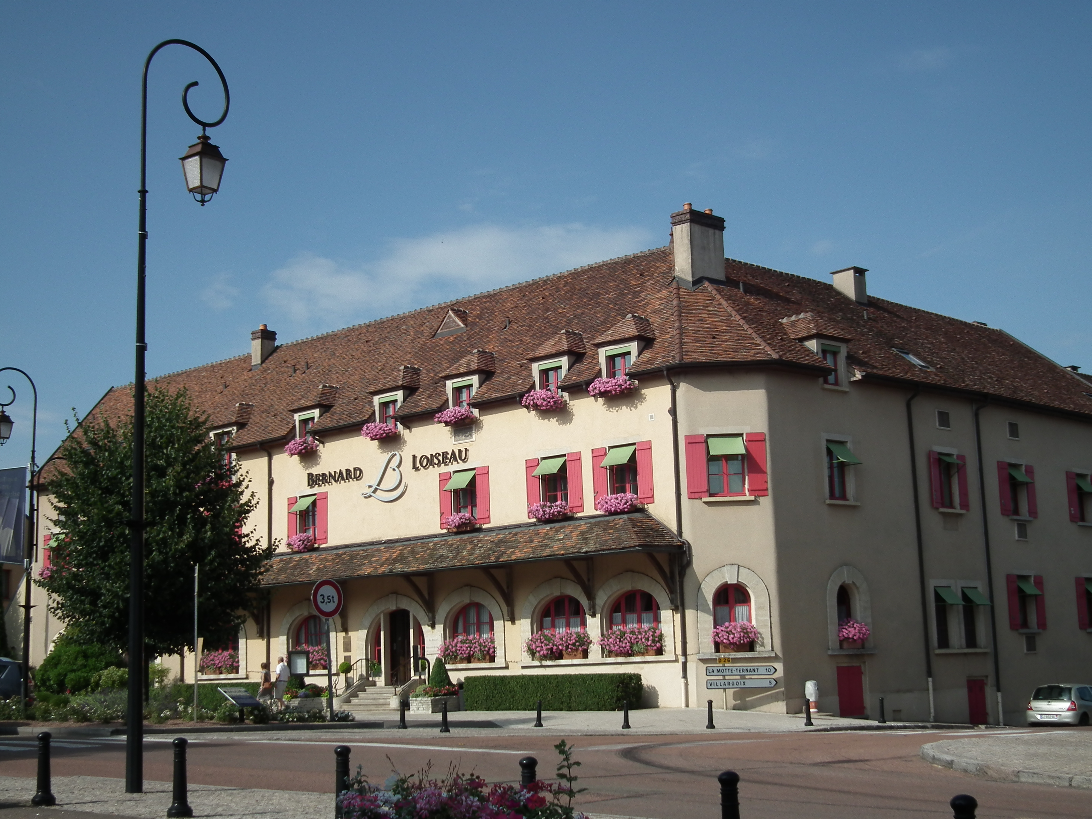 Restaurant gastronomique La Côte d'Or à Saulieu tenu par Bernard Loiseau